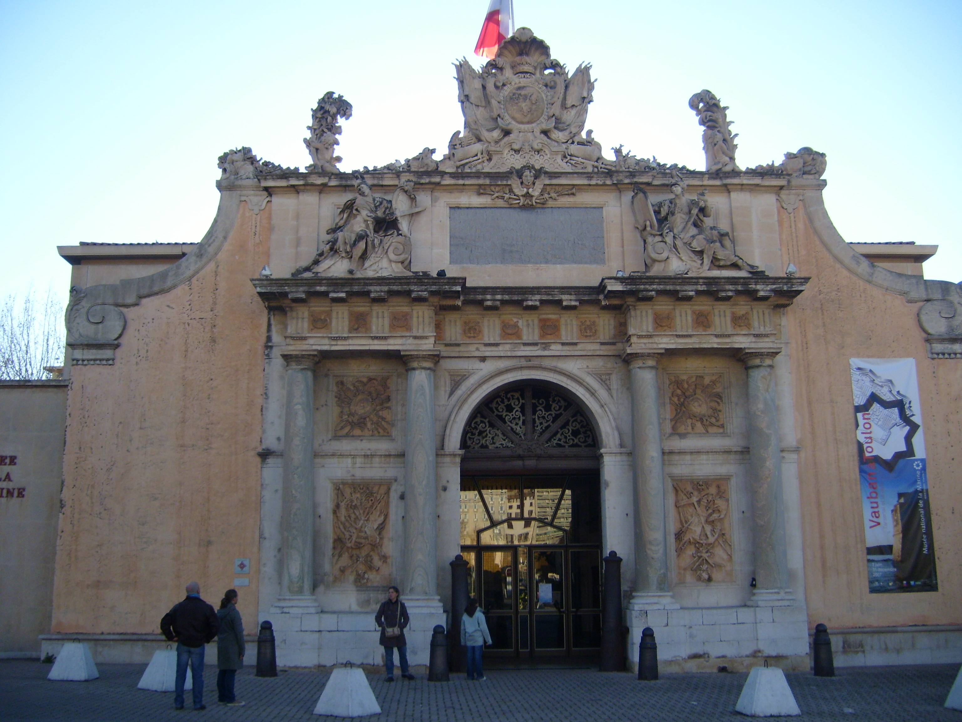 Toulon Naval Museum. Sculptures de Jean-Michel Verdiguier (1706-1796) et de Maucord.